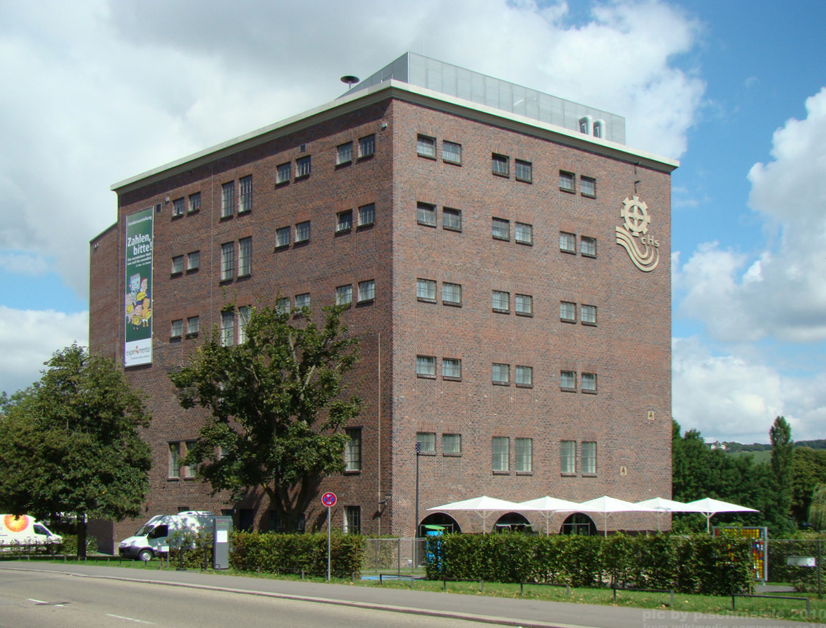 Experimenta in Heilbronn, ehem. Hagenbucher-Gebäude